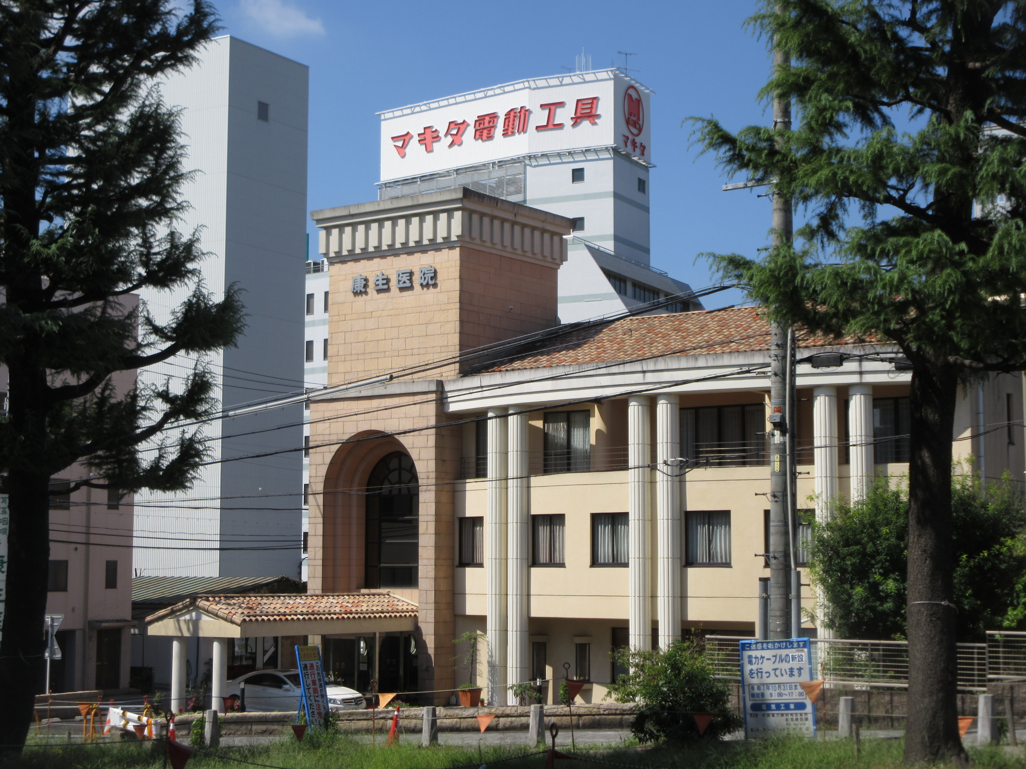 株式会社マキタ元会長の後藤十次郎が創立した牧田電機製作所岡崎支店は、1937年11月に岡崎市康生町（現・康生通南）に新工場を建設した。現在その名残として、マキタの看板が建てられている。